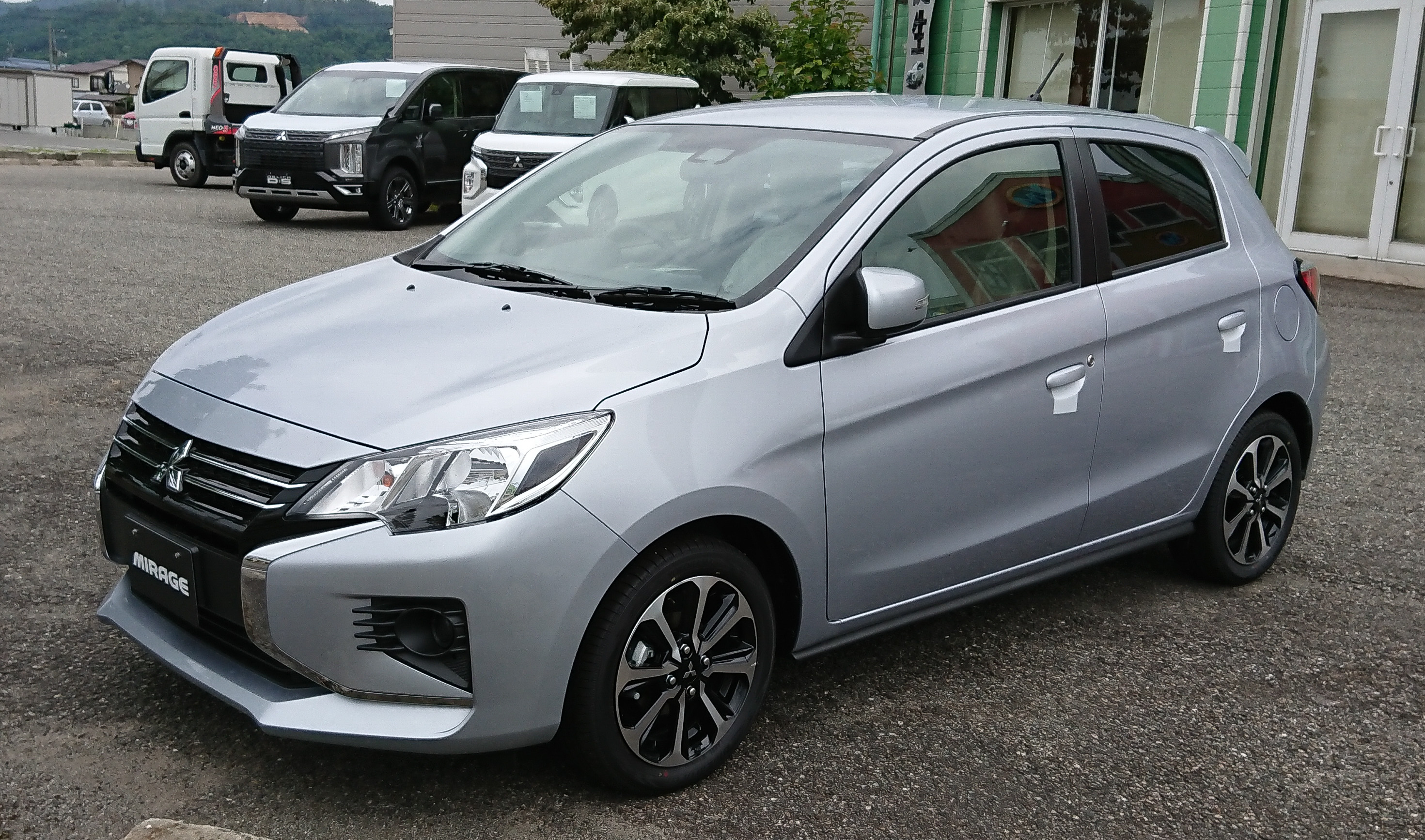 三菱 ミラージュ M